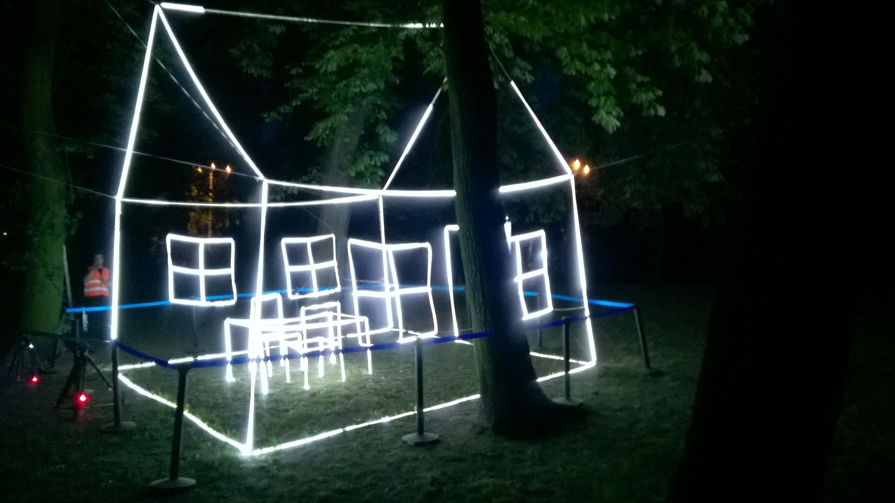 Bella Skyway Festival 2016 - Instalacja „Home”